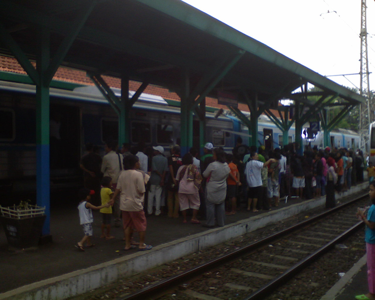 Suasana di peron Stasiun Manggarai.